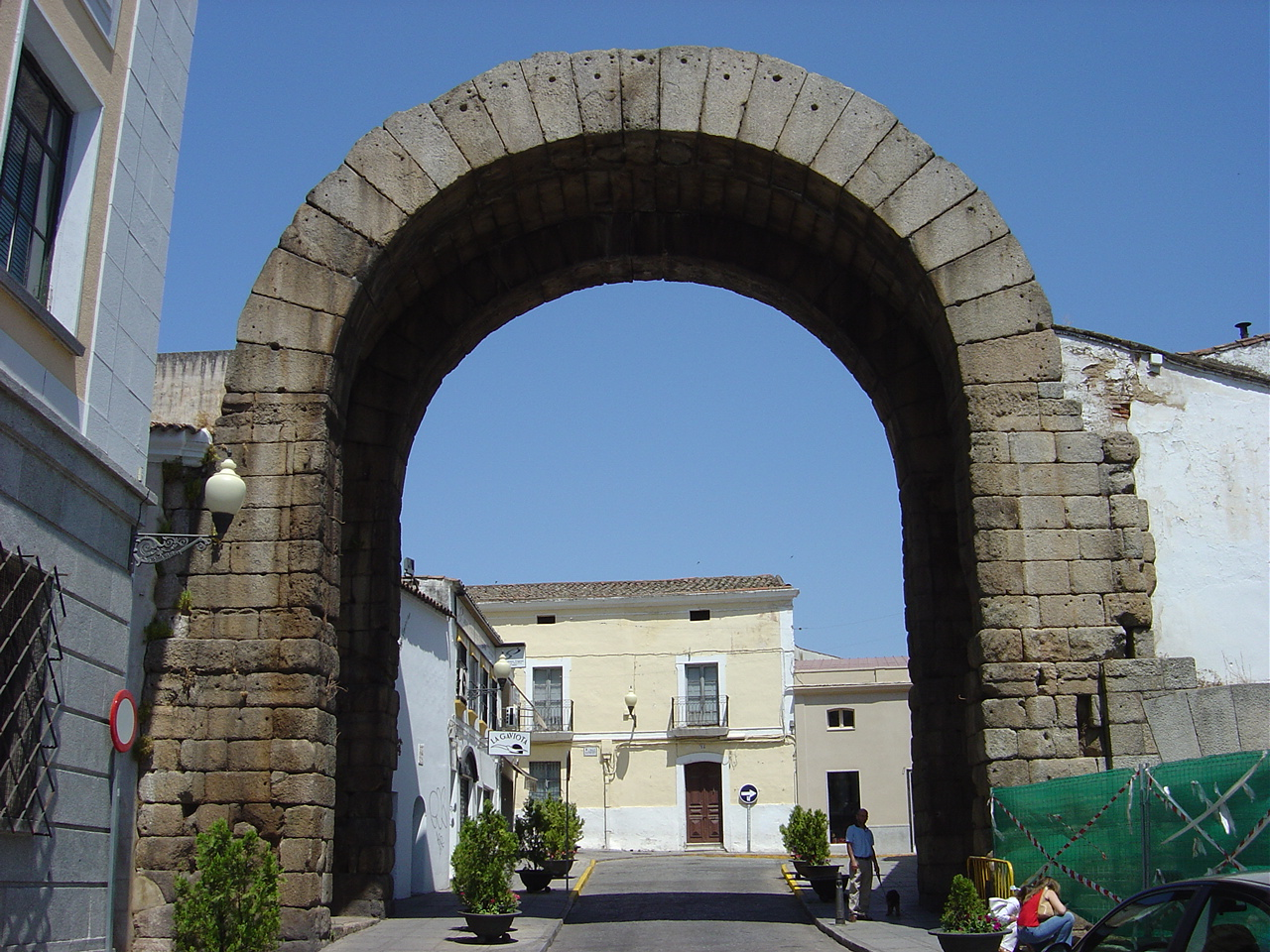 Arco Romano de Trajano (Mérida, Badajoz)